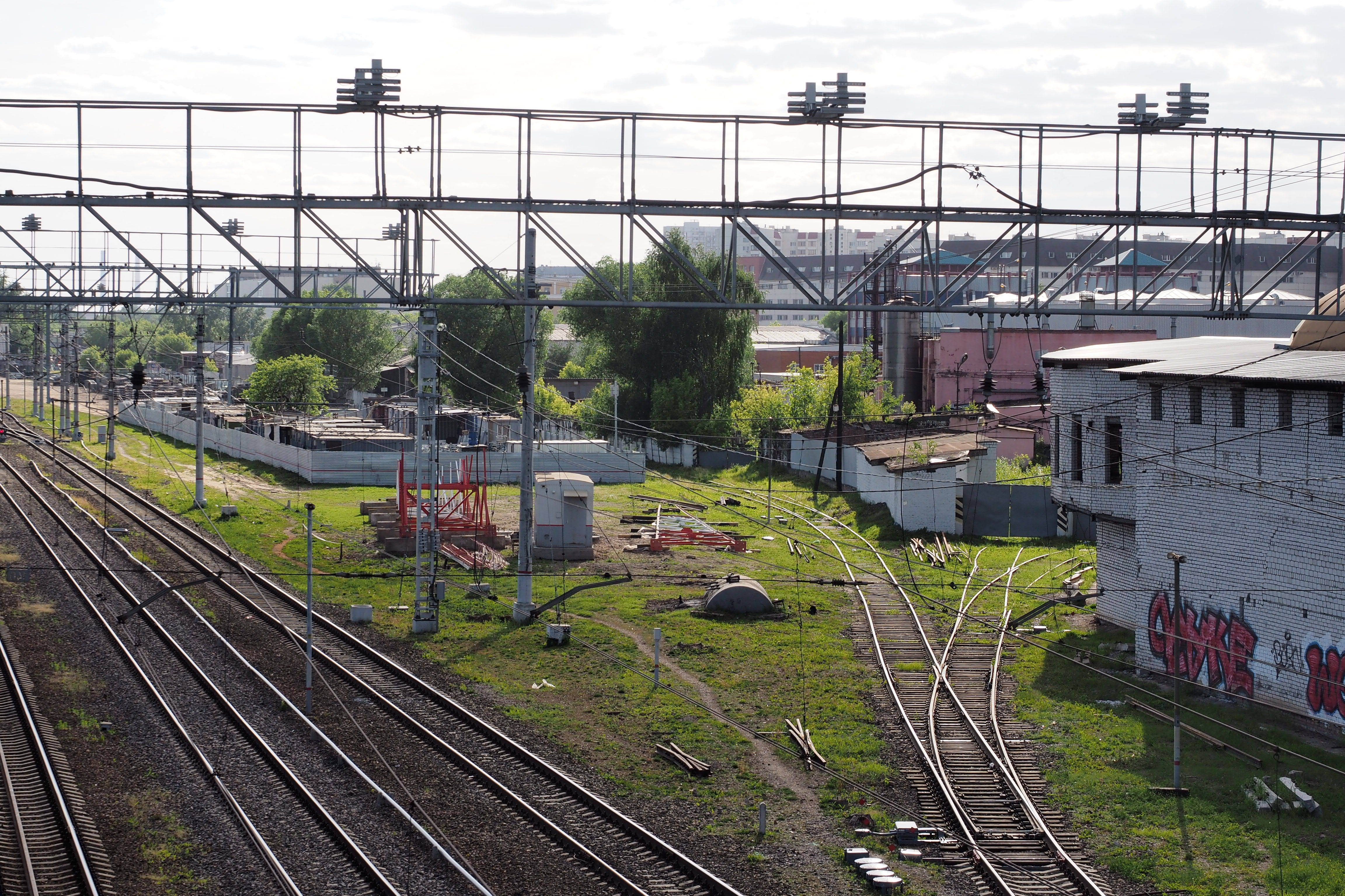 RZD Kuskovo station 2018